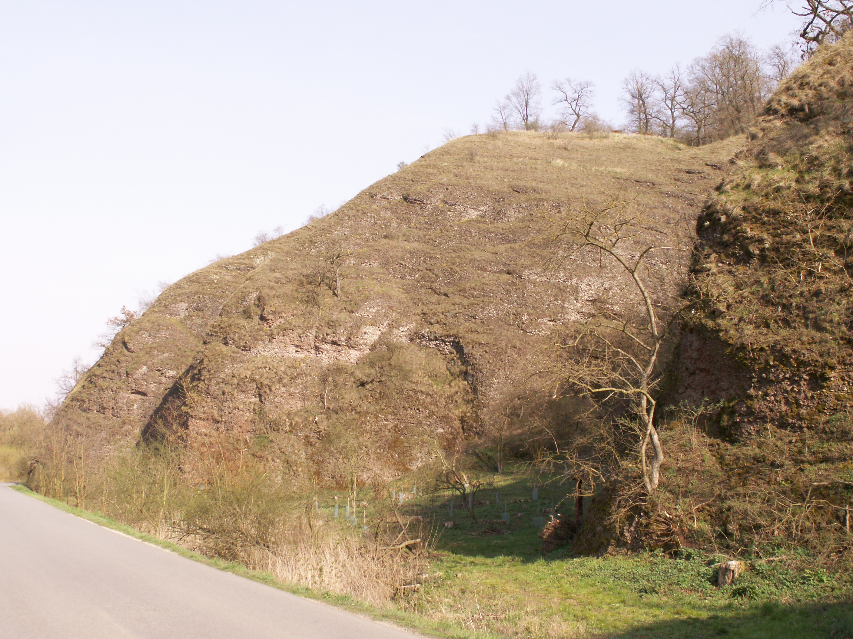 Pekárka, přírodní památka ev. č. 303, která se nachází v Ivančicích v okrese Brno-venkov, na katastru Alexovic